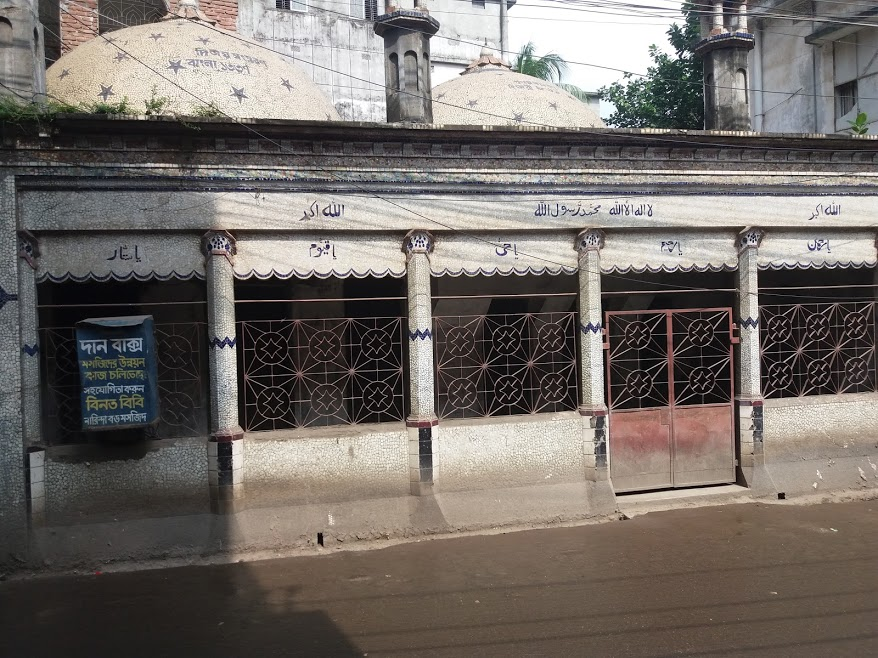 ঢাকা শহরের নারিন্দায় অবস্থিত প্রাচীন একটি মসজিদ